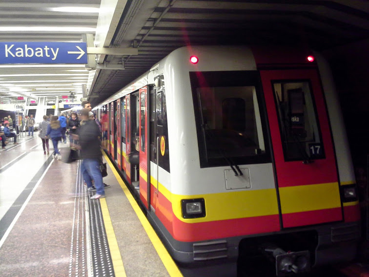 Skład Metropolis nr 17 w nowym malowaniu na stacji Wilanowska.